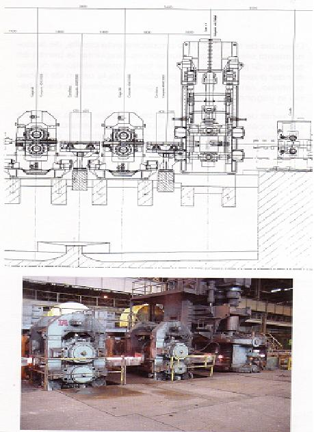 detalle de un desbastador de laminacion en caliente